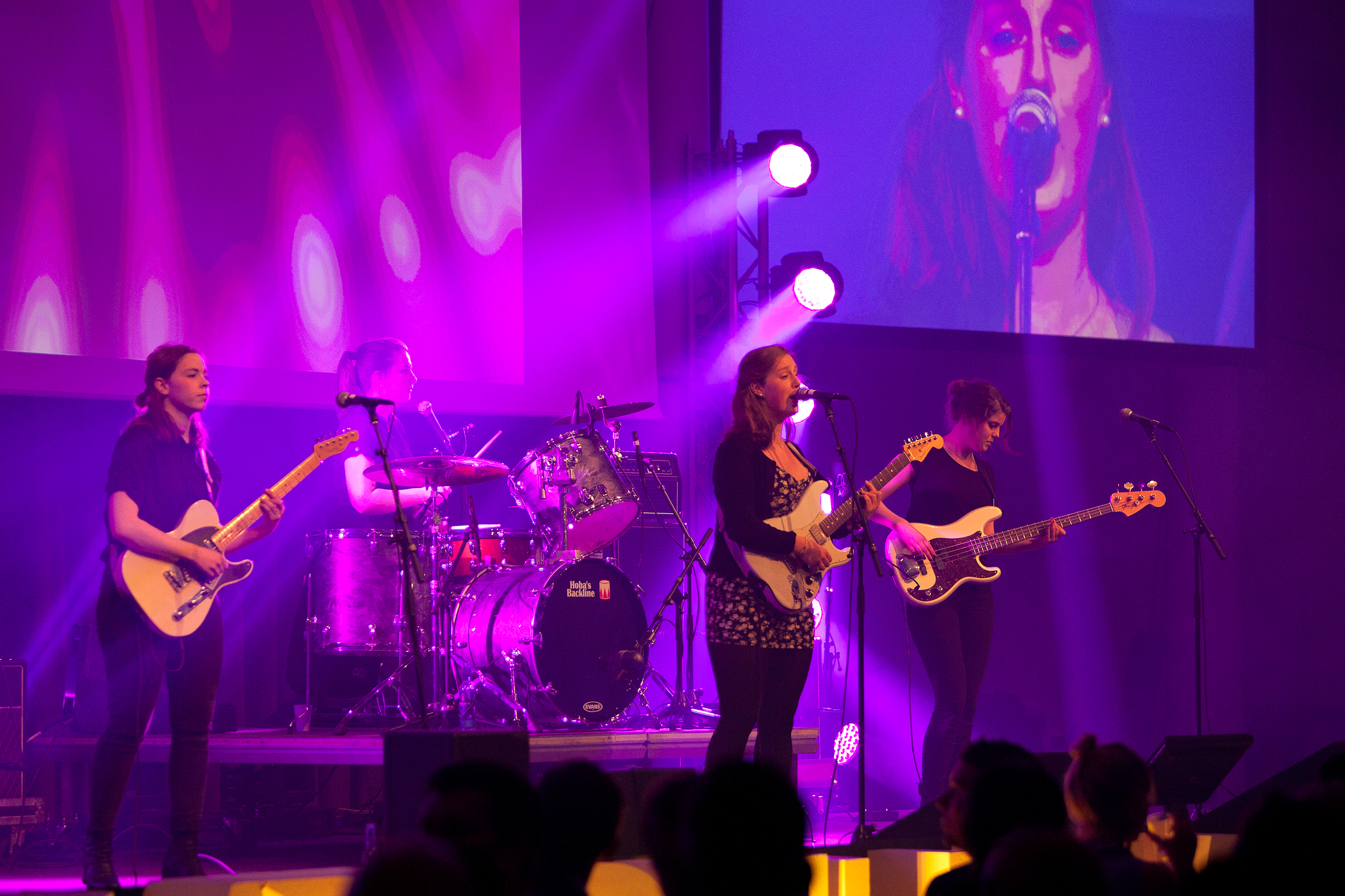 Razika, Gulltaggen 2012. Fotograf: Jarle Naustvik